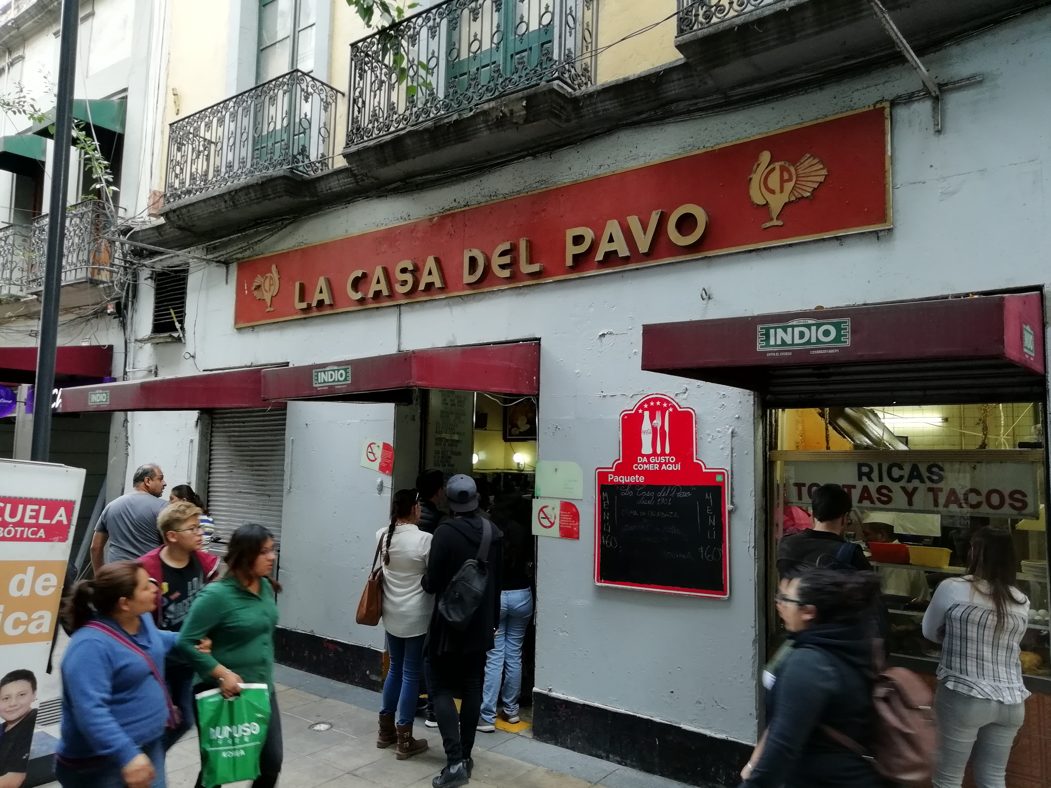 Foto de la entrada al restaurante La casa del pavo, calle Motolonía, Centro Histórico